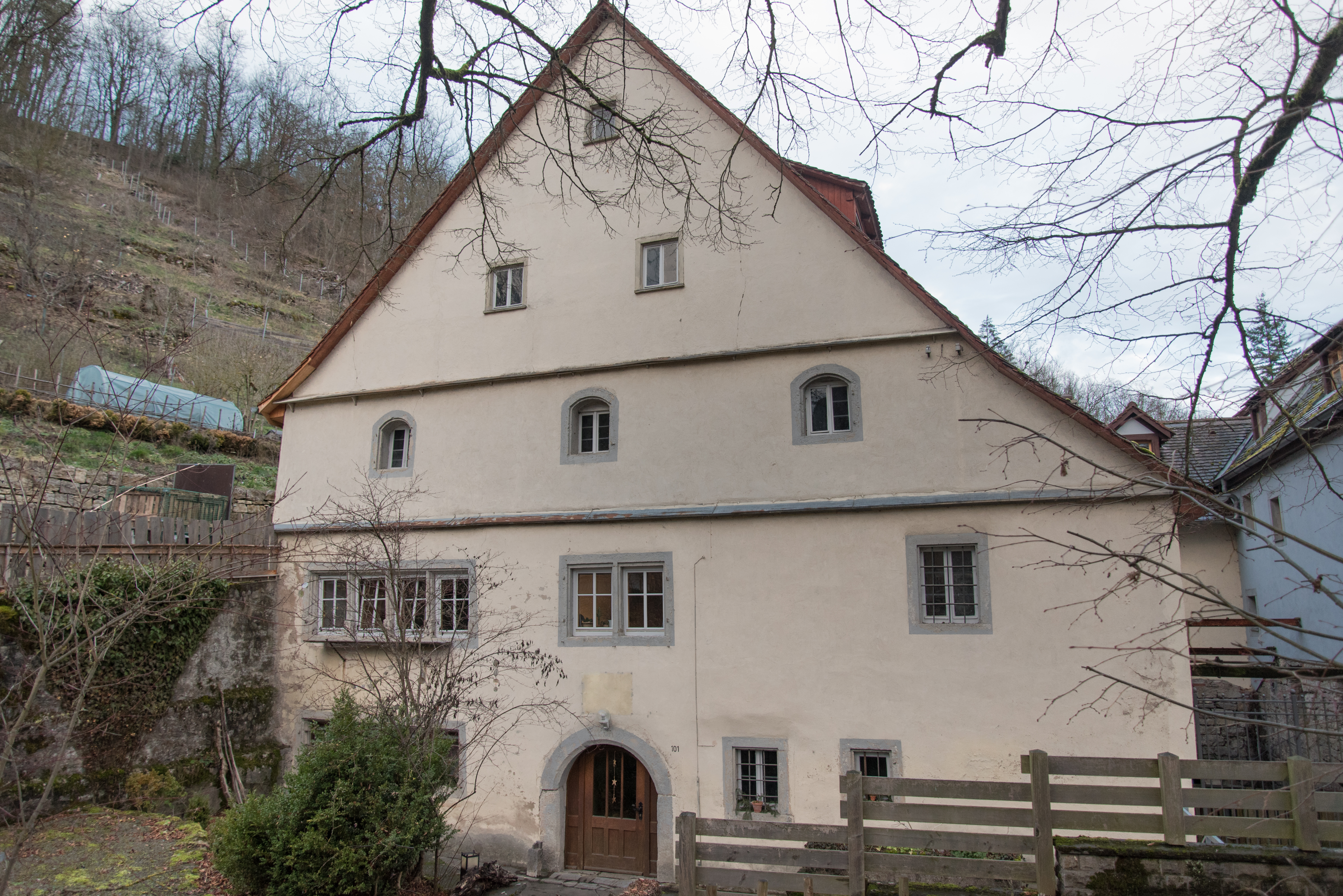 Rothenburg ob der Tauber, Taubertalweg 101